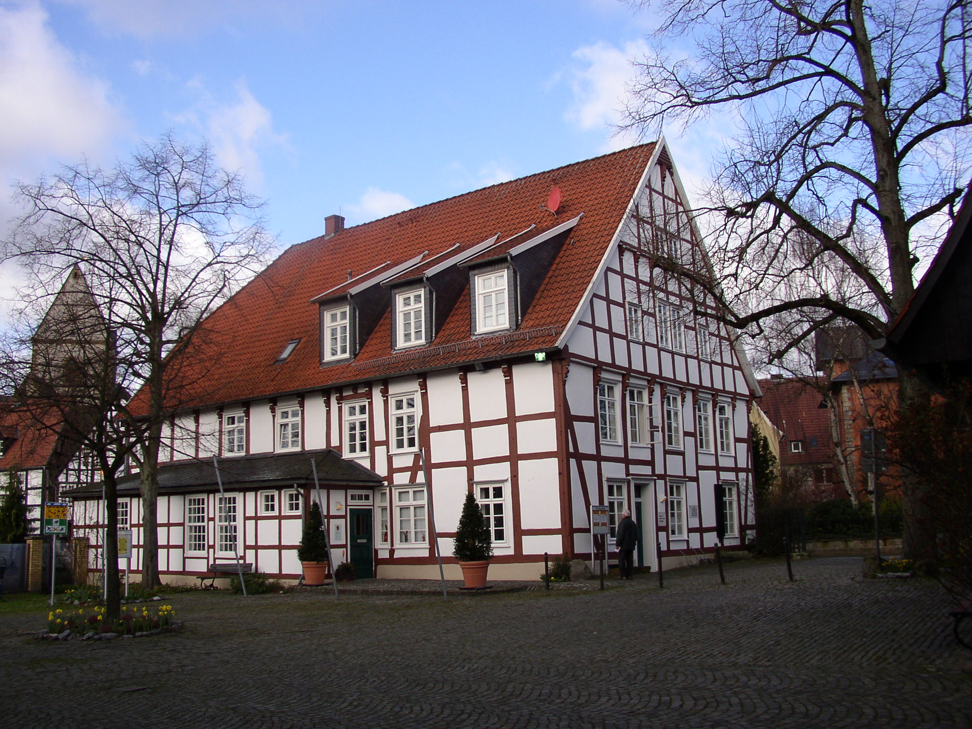 Kiskerhaus, Halle (Westfalen)